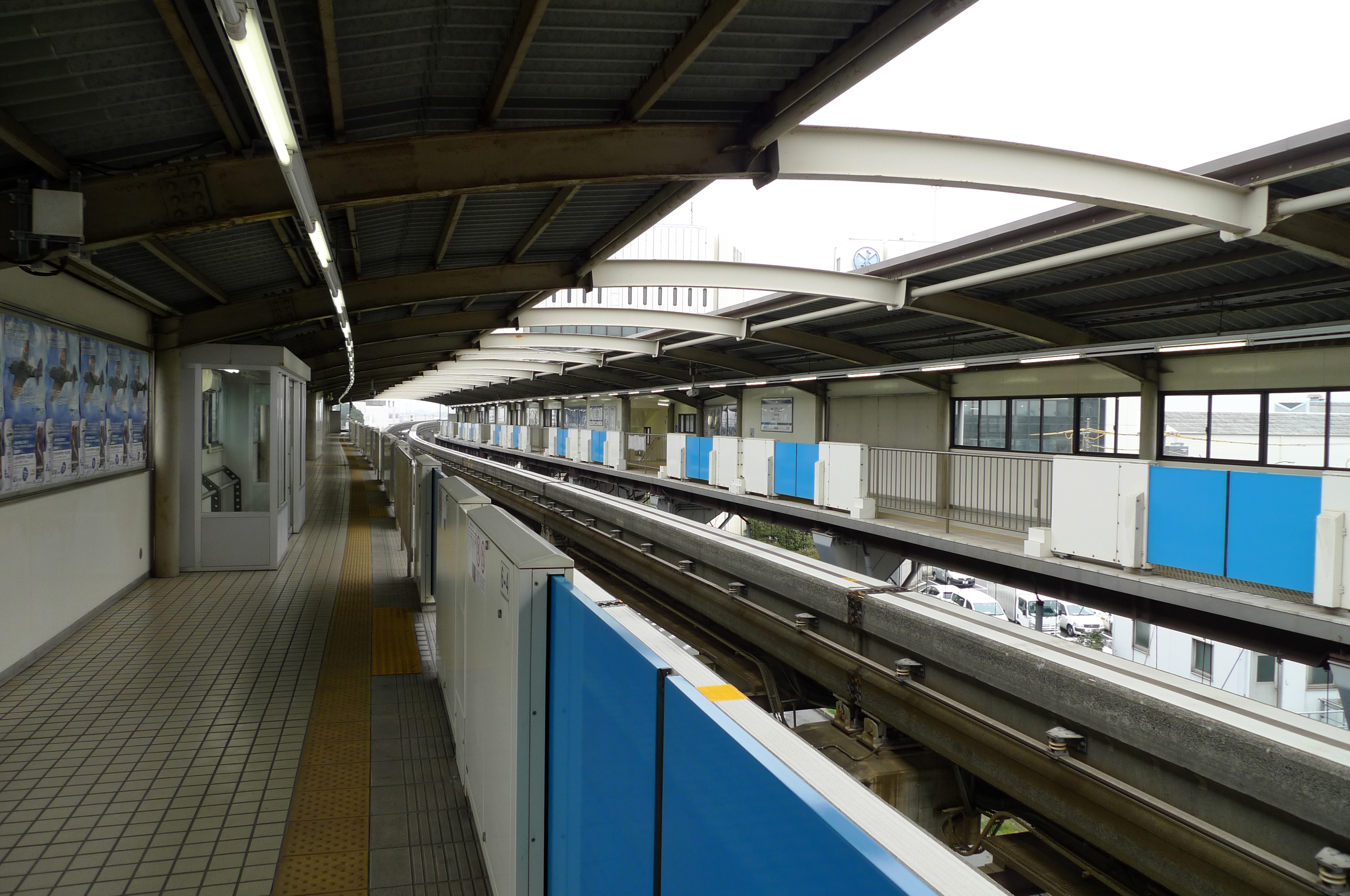 東京モノレール整備場駅ホーム